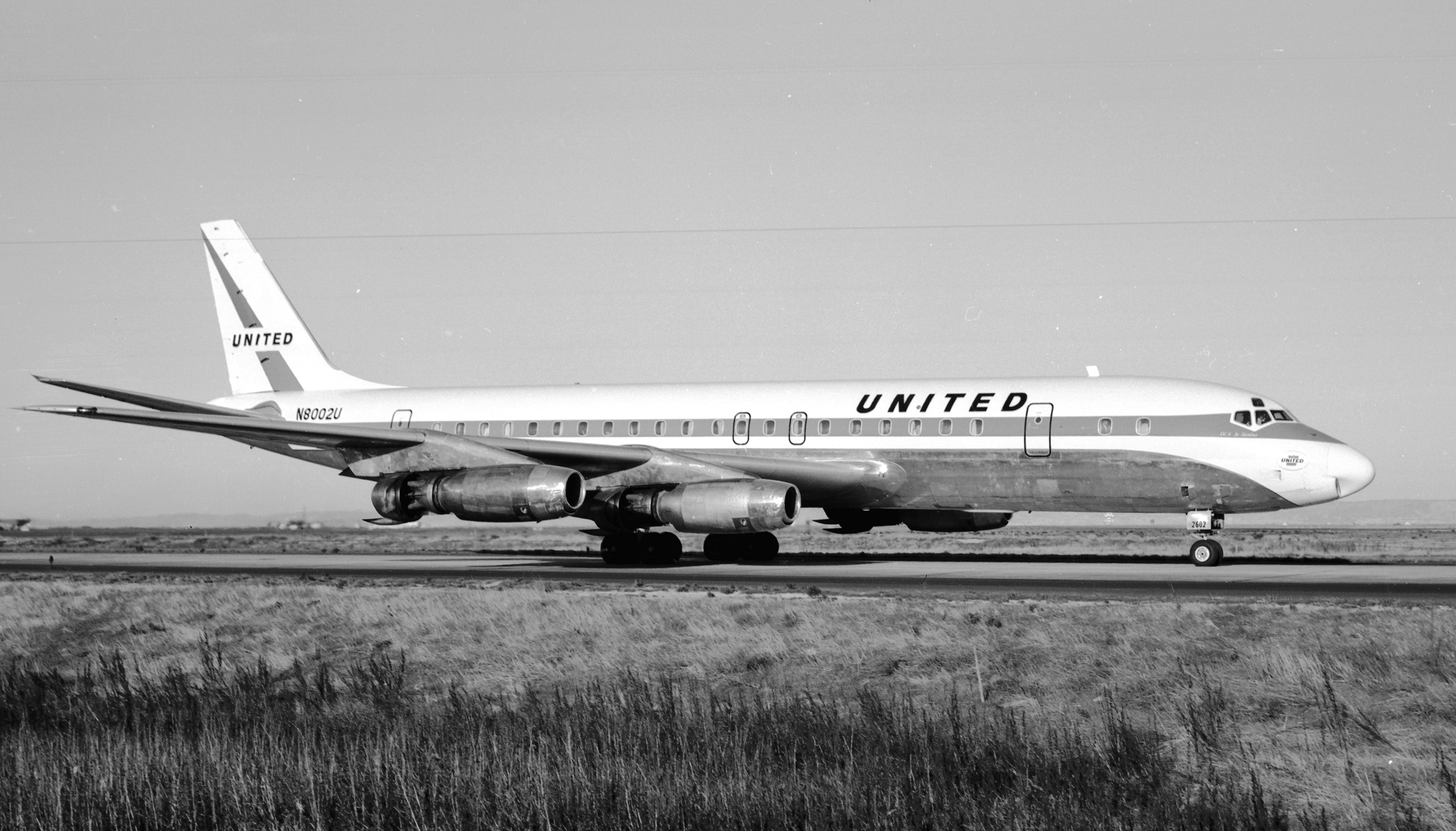 San Francisco Jan 1967.